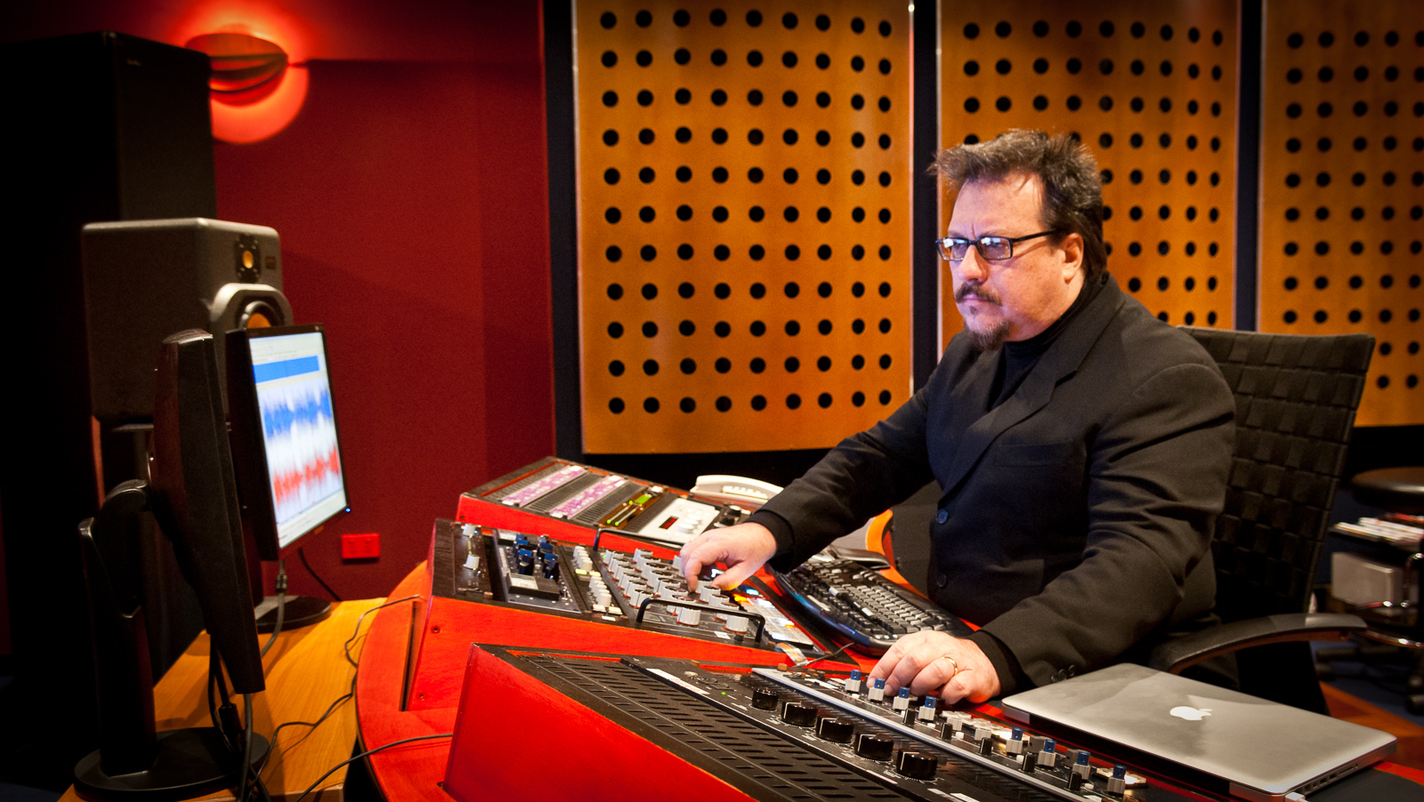 Studios 301 Mastering Engineer Leon Zervos